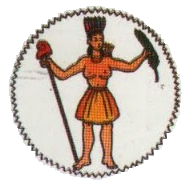 Sello o escudo de armas diseñado por francisco de miranda el 27 de agosto de 1811.